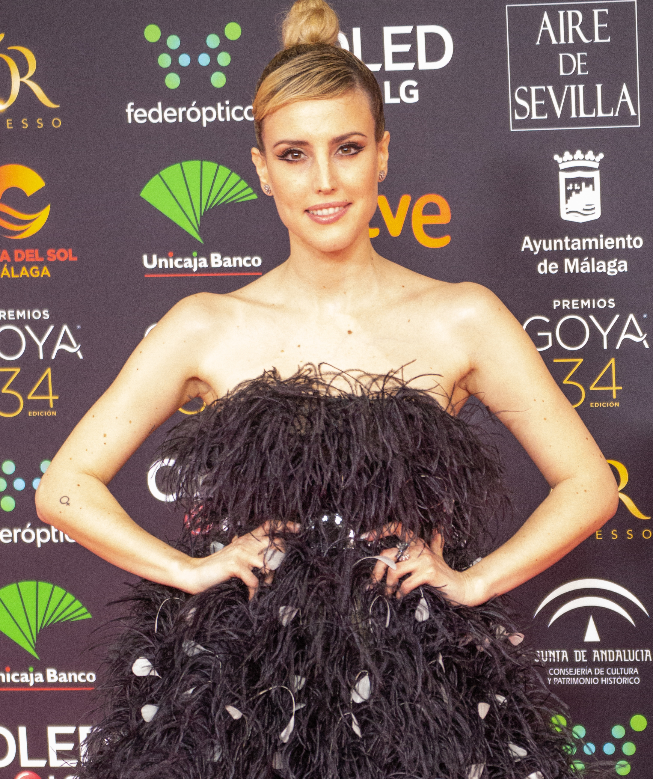 Natalia de Molina en la alfombra roja de la ceremonia de entrega de los Premios Goya 2020, celebrados en Málaga